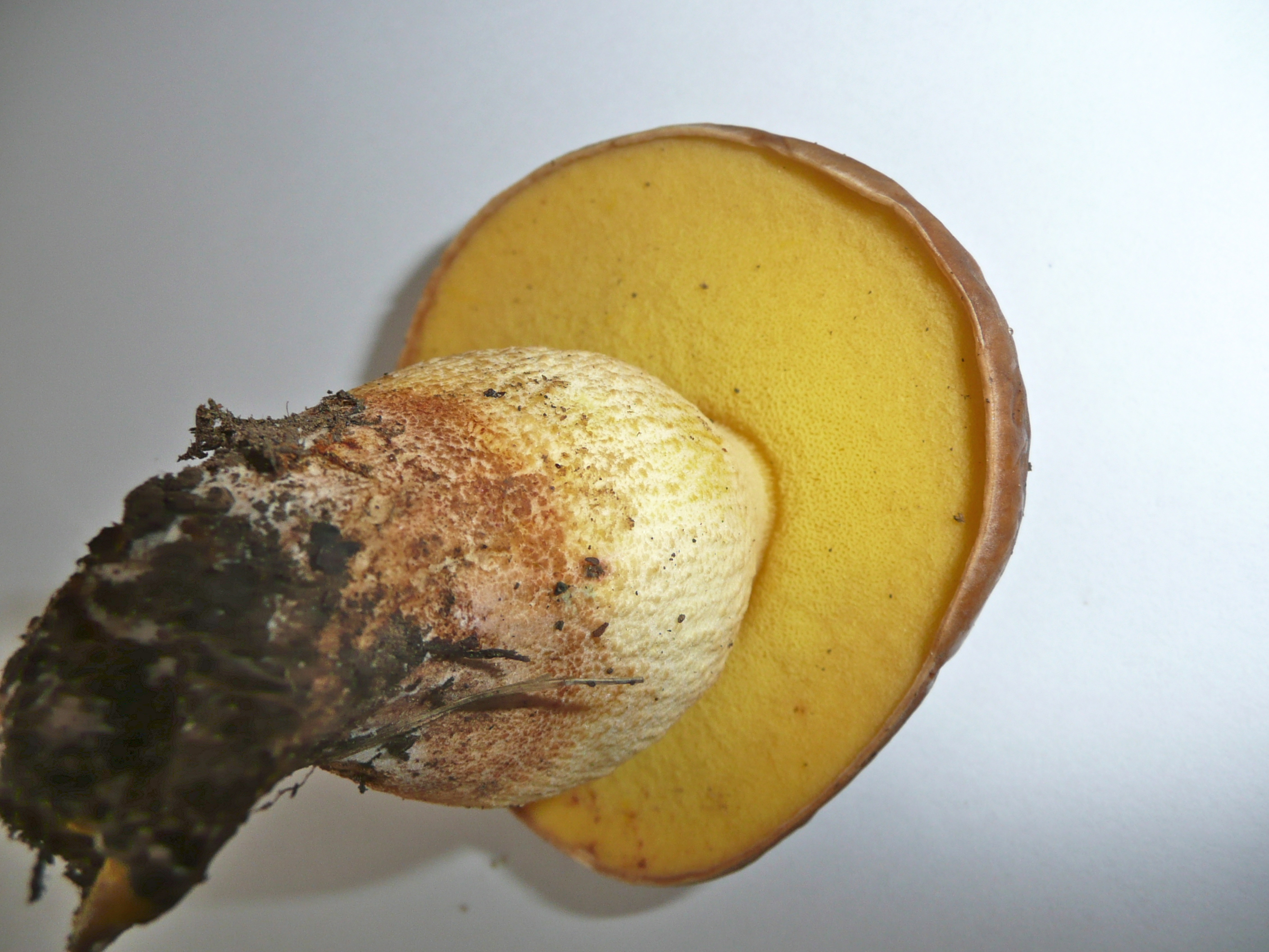 Boletus depilatus Redeuilh